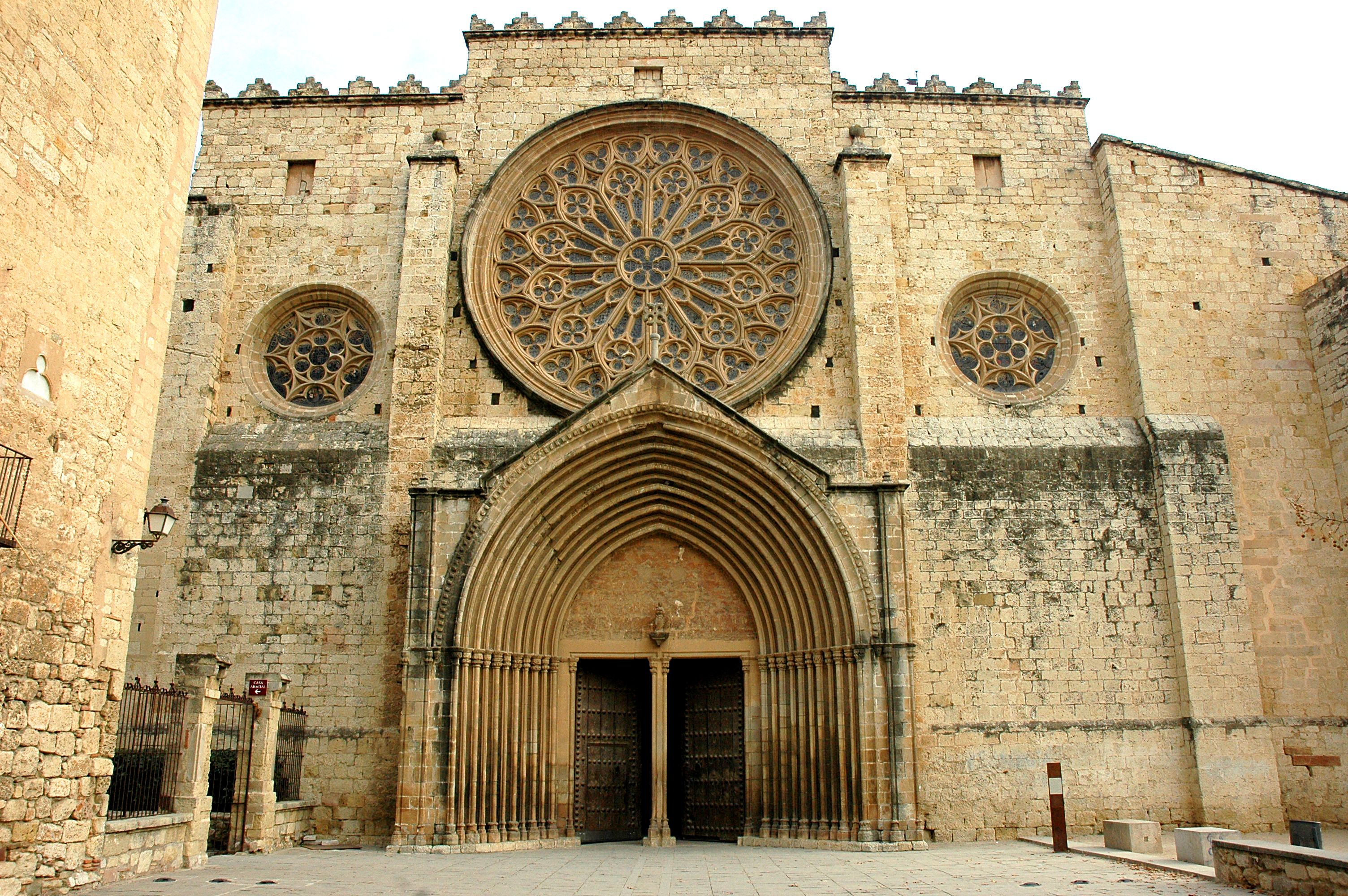 Monestir de Sant Cugat - Façana principal